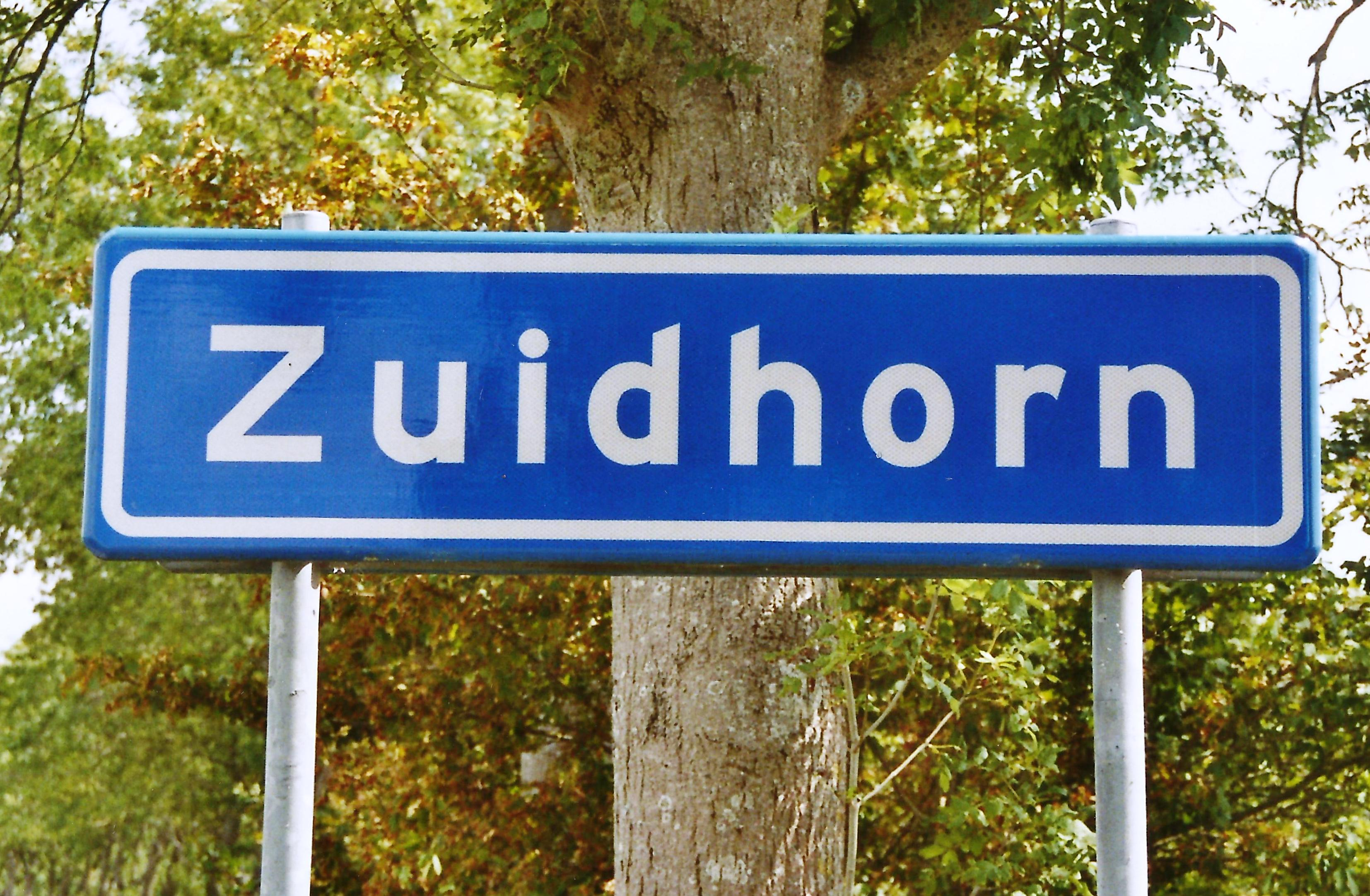 Zuidhorn plaatsnaambord